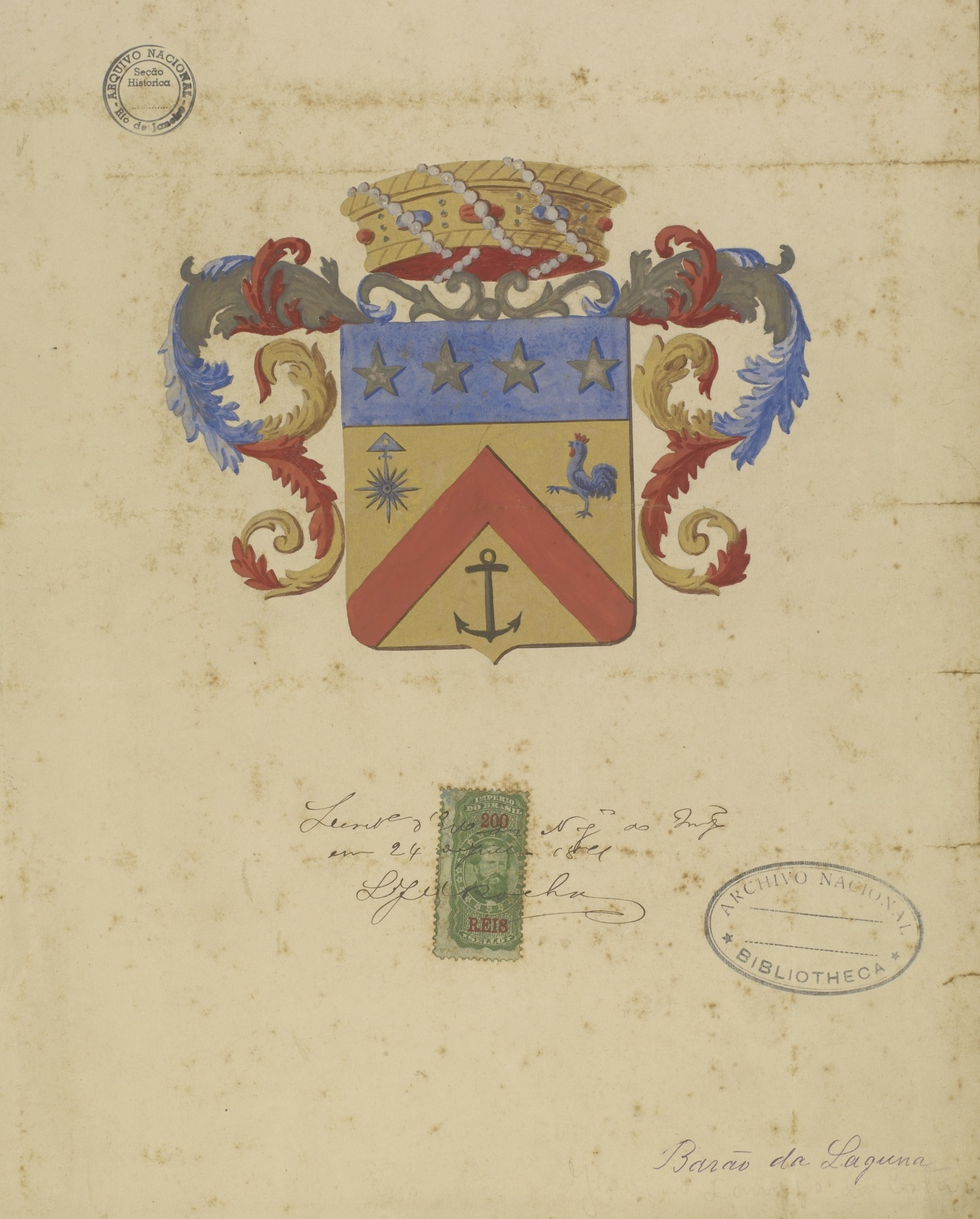 Brasão de Jesuíno Lamego da Costa, Barão da Laguna (SC). Fundo: Brasões.